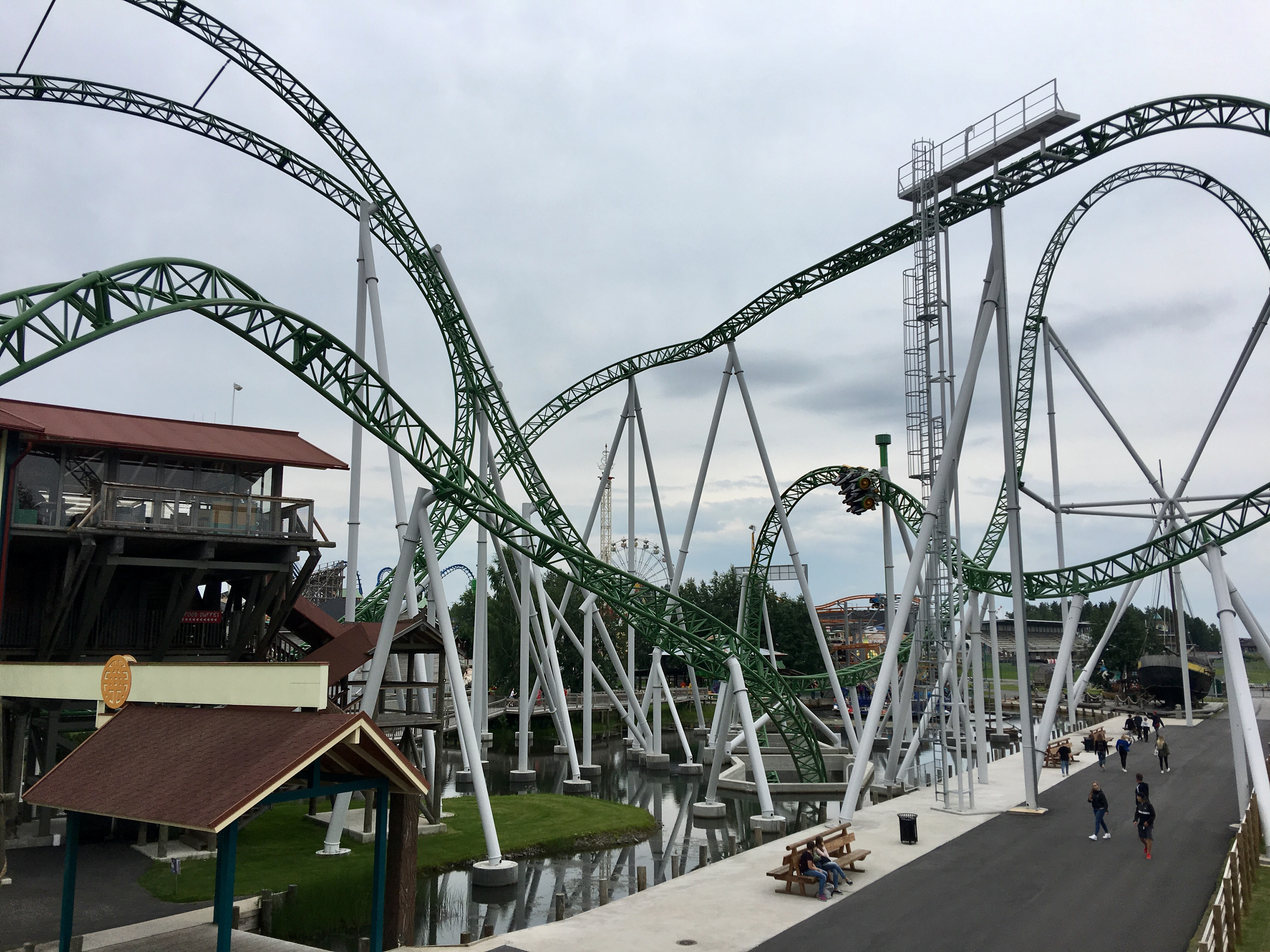 Junker-vuoristorata huvipuisto Powerparkissa, elokuussa 2017.